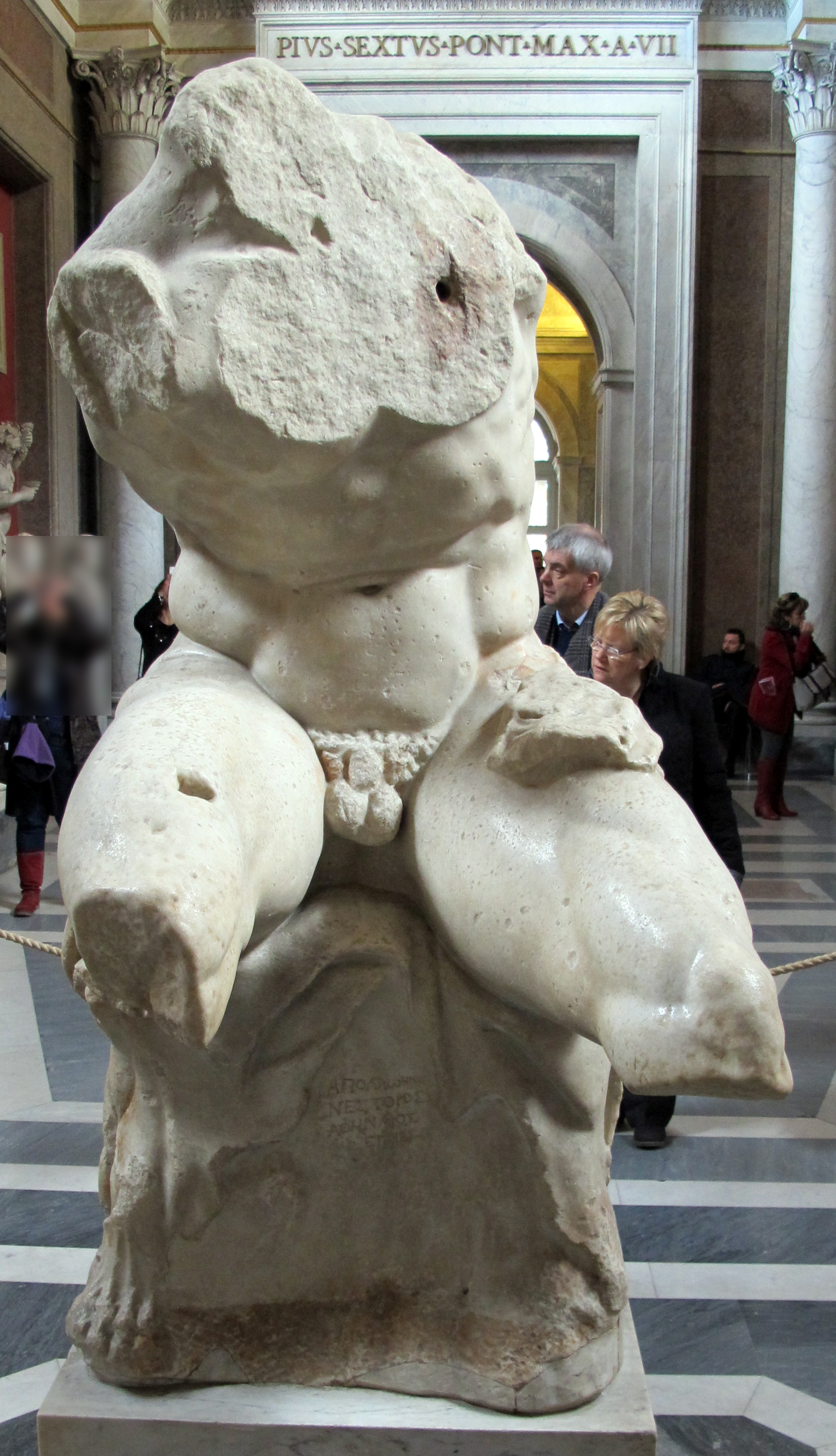 Arte romana nei Musei Vaticani